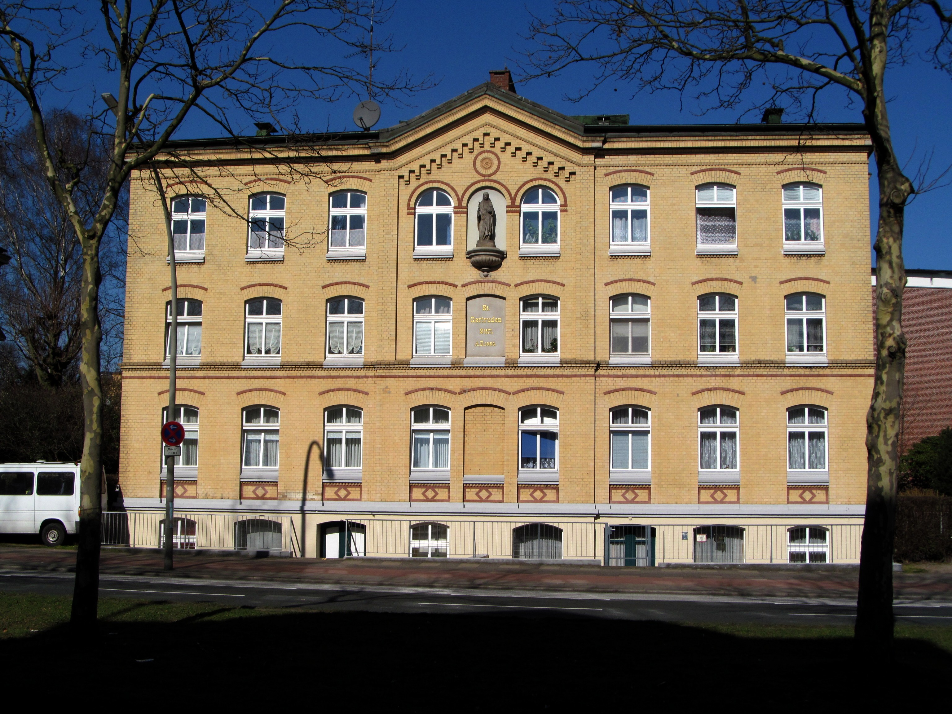 St. Gertrud Stift, Bürgerweide in Hamburg-Borgfelde This is a photograph of an architectural monument.